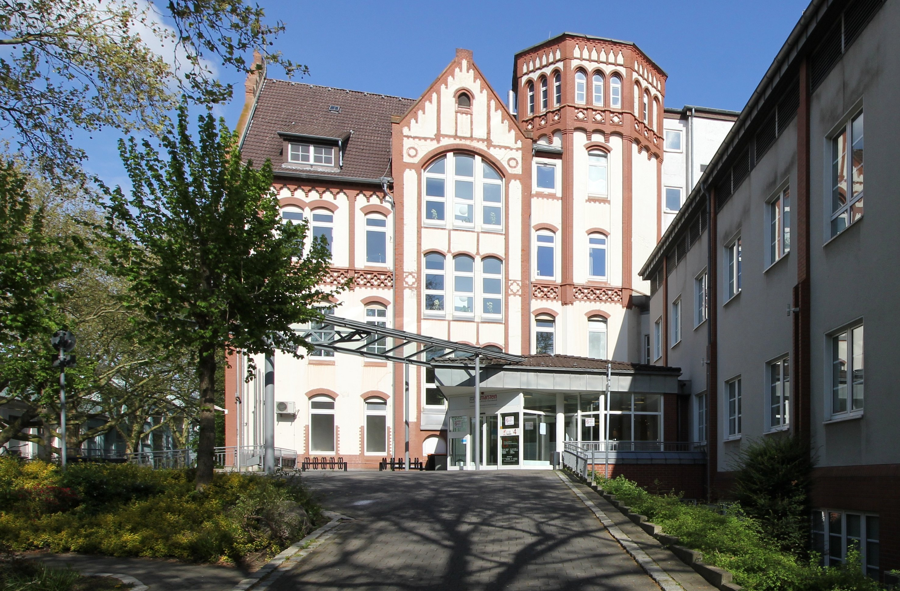 Ortho-Klinik Dortmund im ehemaligen Krankenhaus "Bethanien" in Dortmund-Hörde